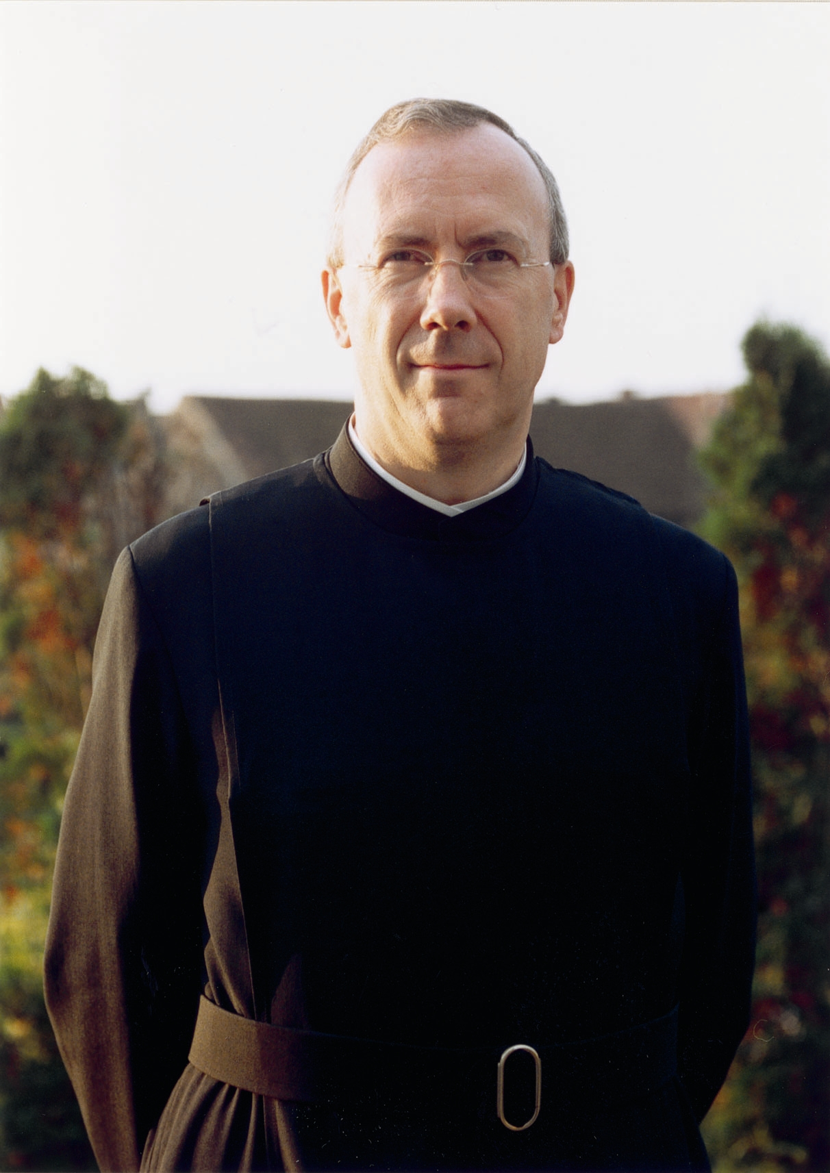 Broeder René Stockman, generaal overste van de Broeders van Liefde.